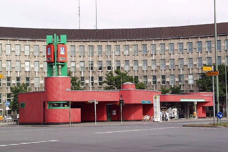 U-Bahn Berlin, Bahnhof Fehrbelliner Platz (Linien U3 and U7)